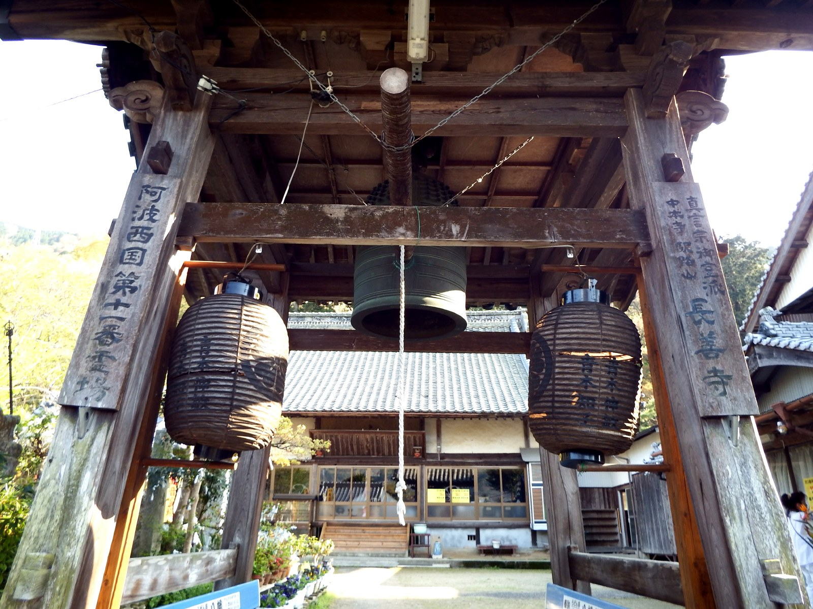 長善寺の山門